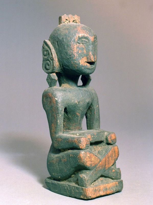 Beeld. Er zijn drie typen beelden te onderscheiden op Leti: voorouderbeelden, beelden van stamouders, die verbonden waren met de oorsprong en stichting van de afstammingsgroepen, en beelden van hemel en aarde voorgesteld respectievelijk als man en vrouw. Onderhavig beeld is een voorouder. Men is er van overtuigd dat iemands "schaduwbeeld" na de dood voortbestaat. Aangenomen wordt dat deze na het overlijden nog enkele dagen rondzwerft in de woonplaats en vervolgens vertrekt naar een dodendorp, gesitueerd op een onbewoond eiland, een rif of een kaap, niet ver van de wereld der levenden. Het beeld stelt de nabestaanden in staat in contact te treden met de overledene. Gewoonlijk offerde men sirih, pinang en palmwijn. Tijdens de offerande was de schaduw van de overledene tijdelijk in het beeld aanwezig. De beelden stonden meestal opgesteld op de huiszolder. De schaduwen werden geacht de huiszolder te bereiken via openingen in de gevel, soms via een speciaal aangebracht luikje.. Houten voorouderbeeld Unknown language: yene iene